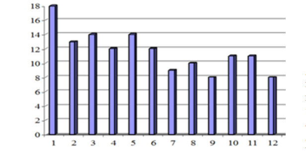 qrafik